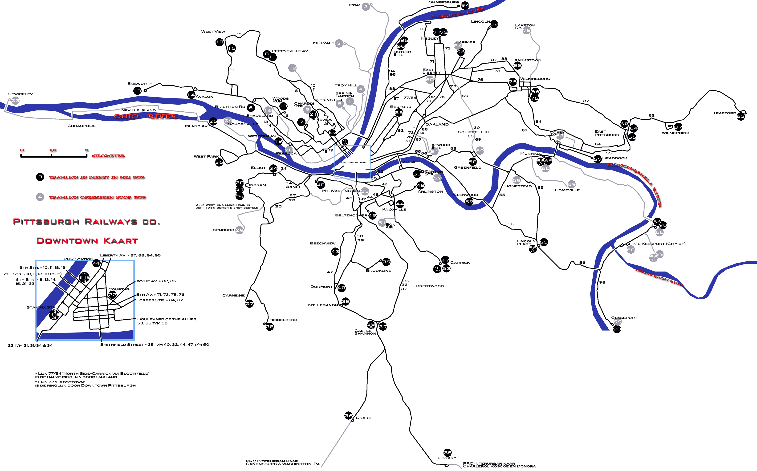 Schematische weergave tramnet PRC in 1959